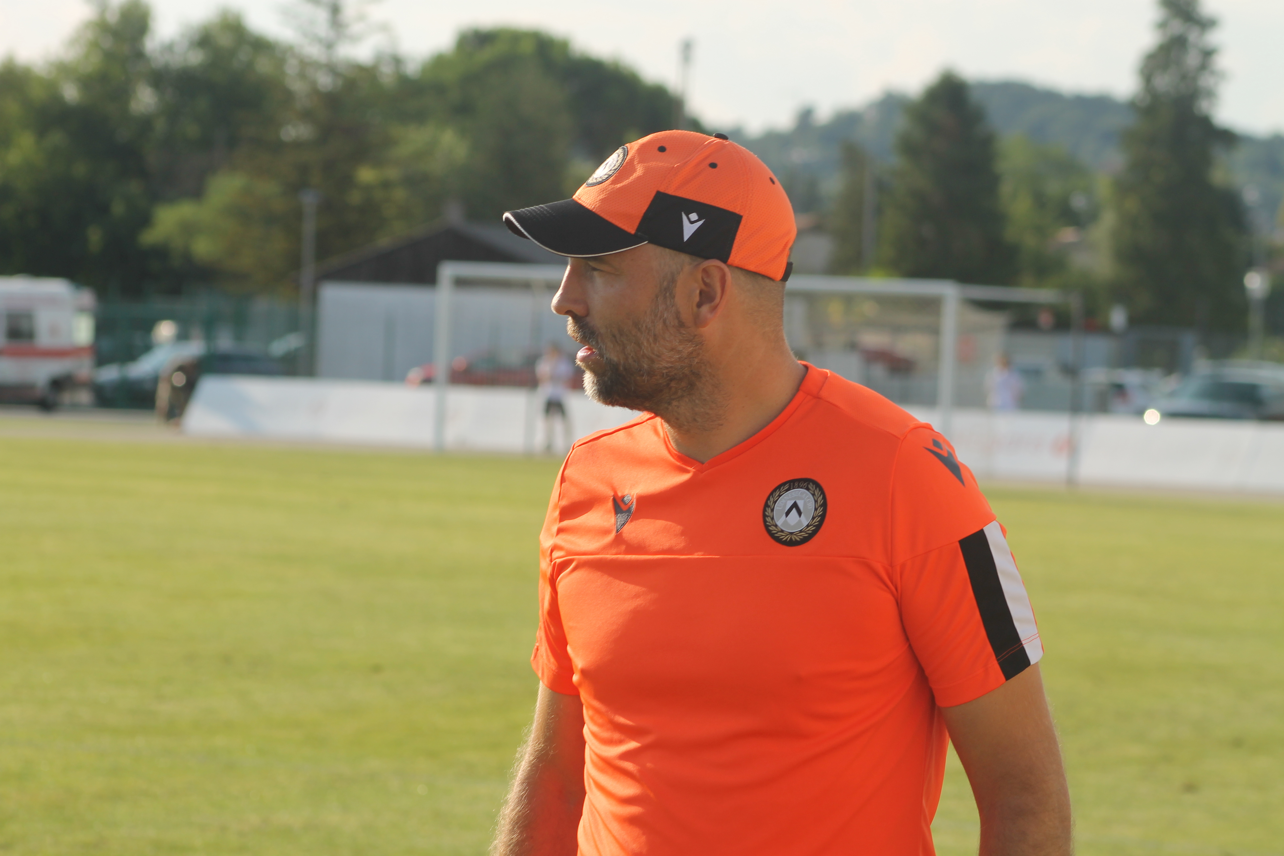 Igor Tudor con la divisa dell'Udinese